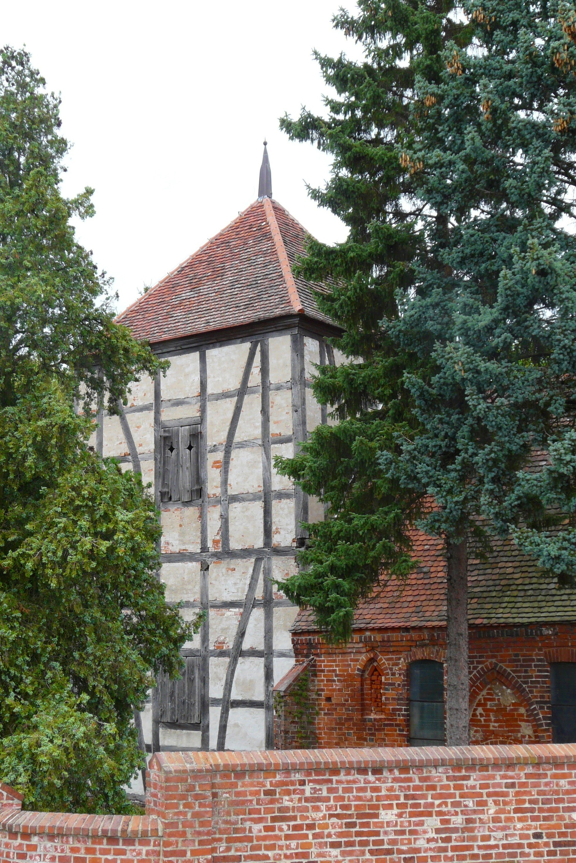 Da steht sie nun, ihr Fachwerkturm lugt zwischen Bäumen zum Fluss hin hervor. Aber brauchen sie die gerademal 41 Einwohner (1915) des Dörfchens noch? Die Antwort gibt die Realität. Sie ist ein klares Nein!